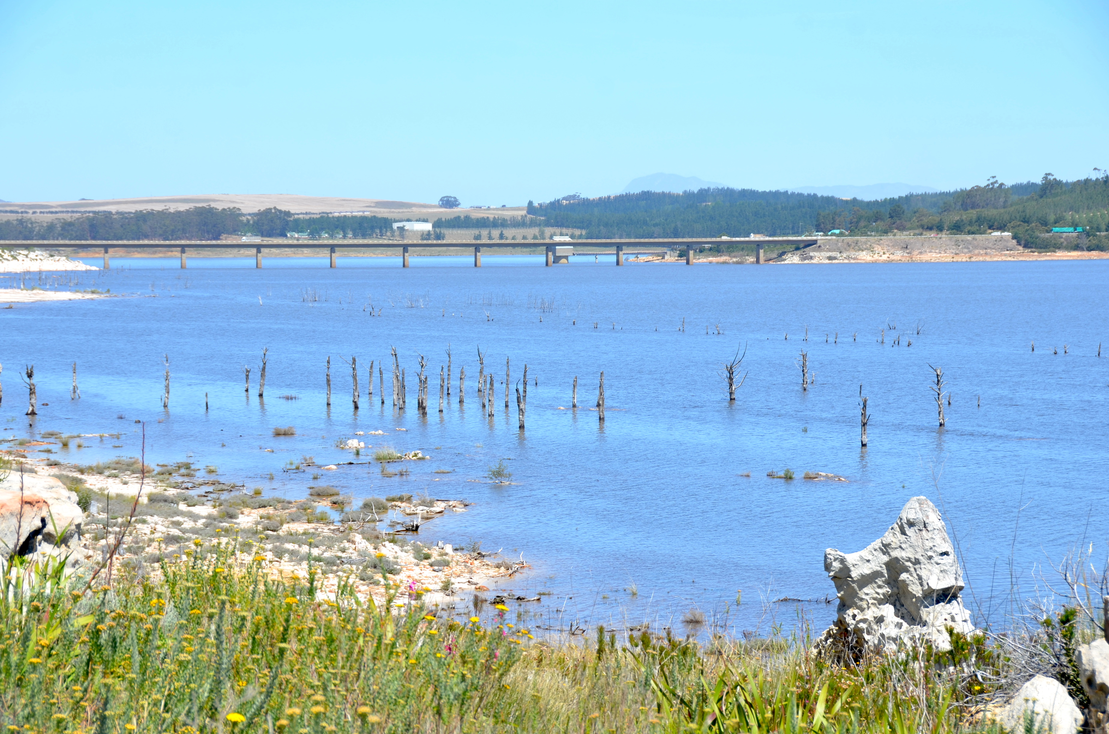 Regional Route 321 über den Theewaterskloof-Damm